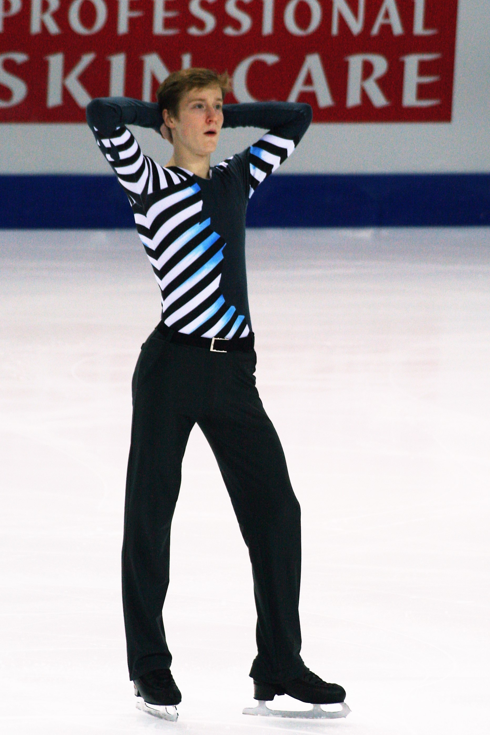 Александр Самарин (Россия) на финале Гран-при по фигурному катанию среди юниоров 2016-2017